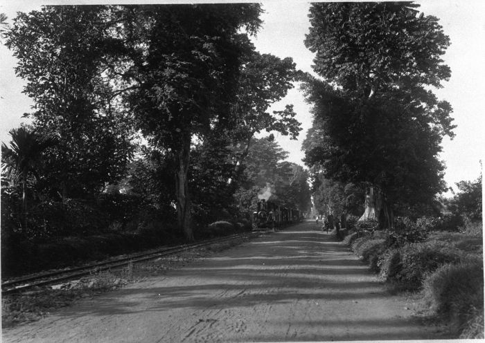 Foto. Stoomtram langs de weg naar Poeger bij Djember, Oost-Java